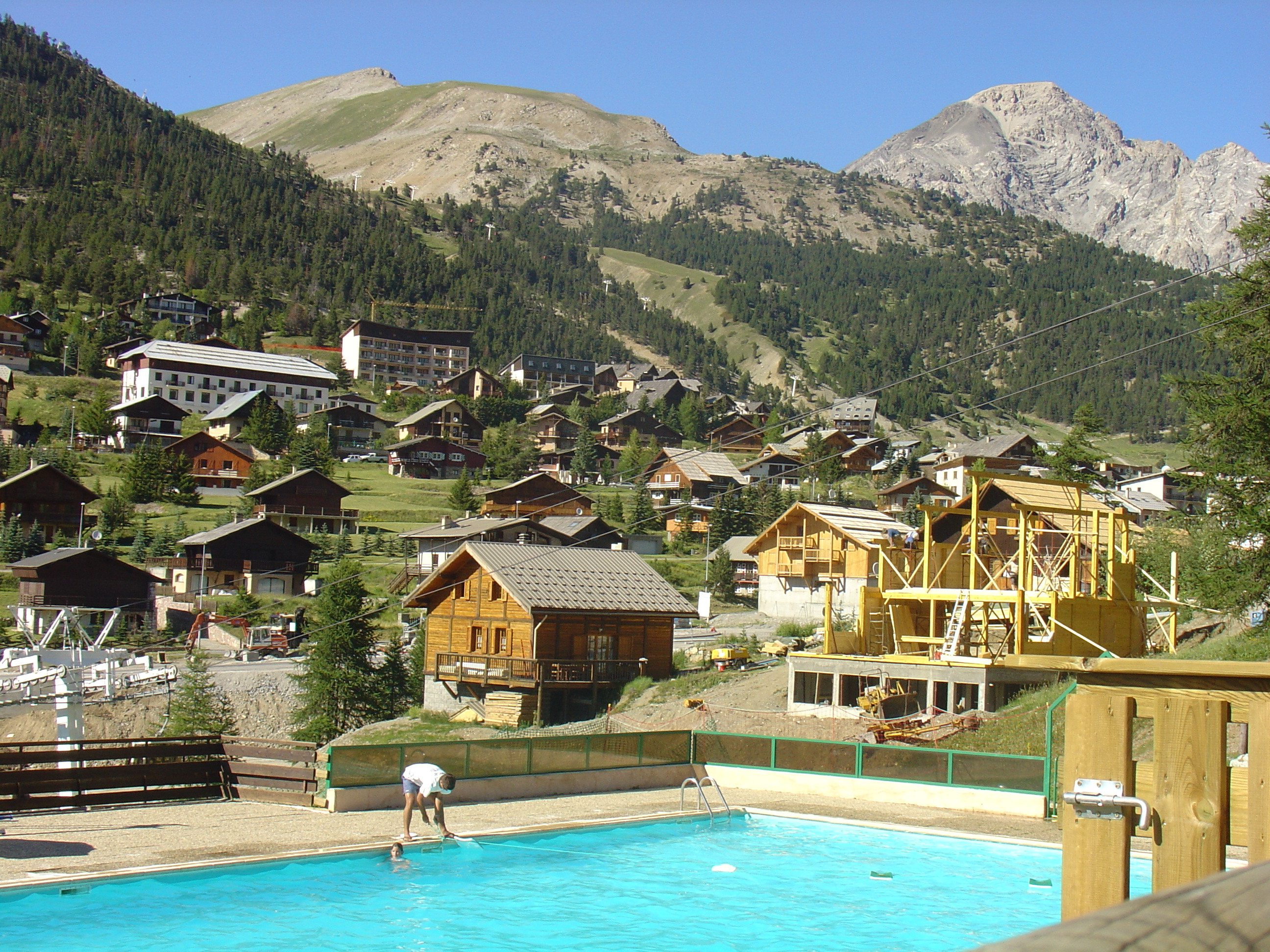 Village de Montgenèvre